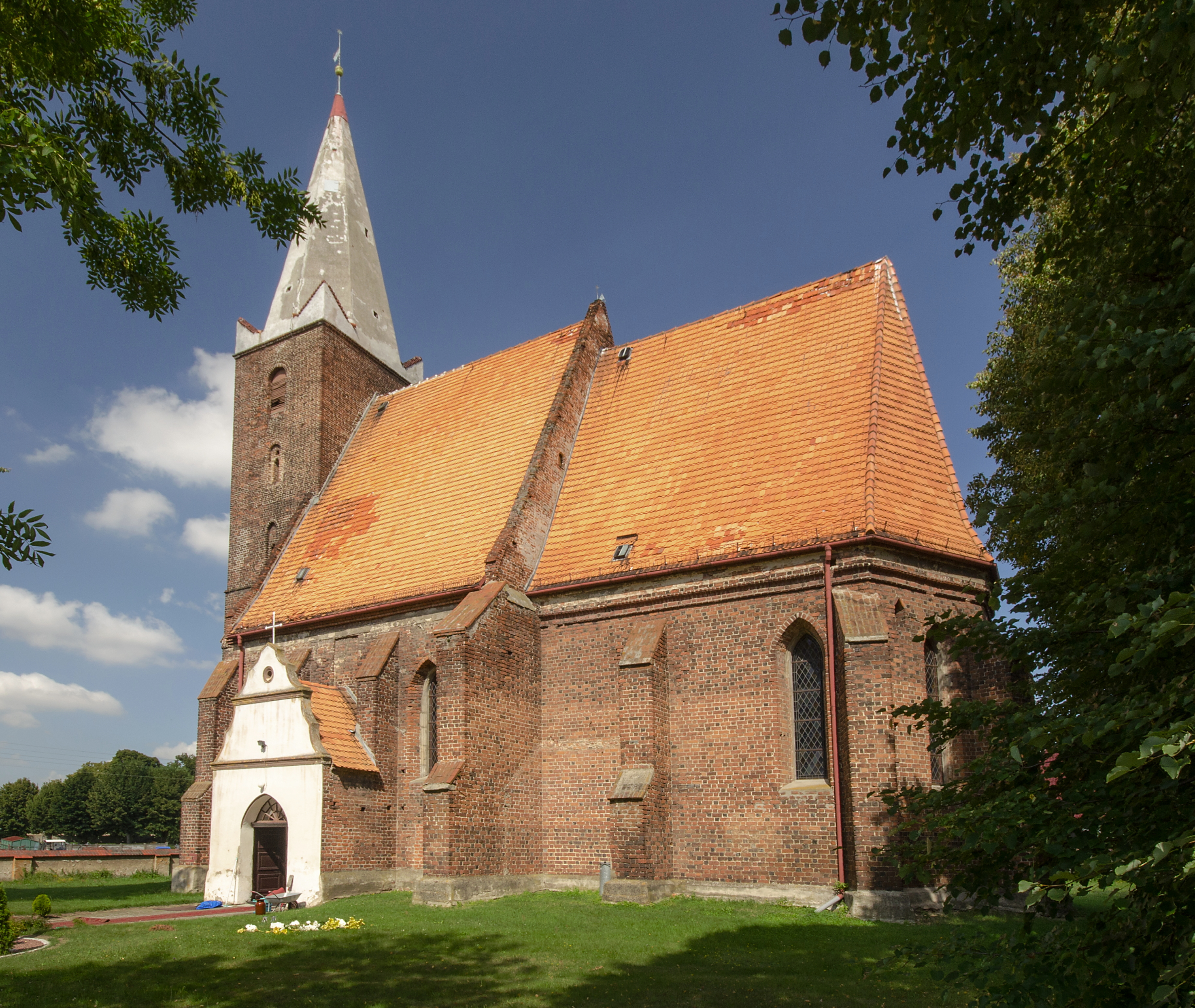 Młodoszowice - rzymskokatolicki kościół filialny p.w. św. Marcina, XV/XVI